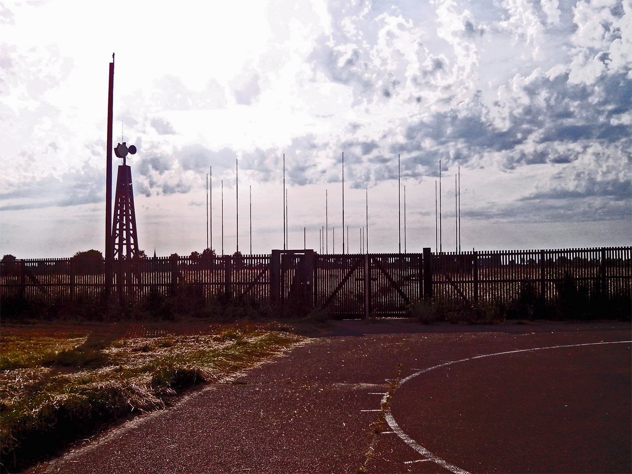 Wullenwever-Ringpeiler der Bundespolizei bei Swisttal-Heimerzheim